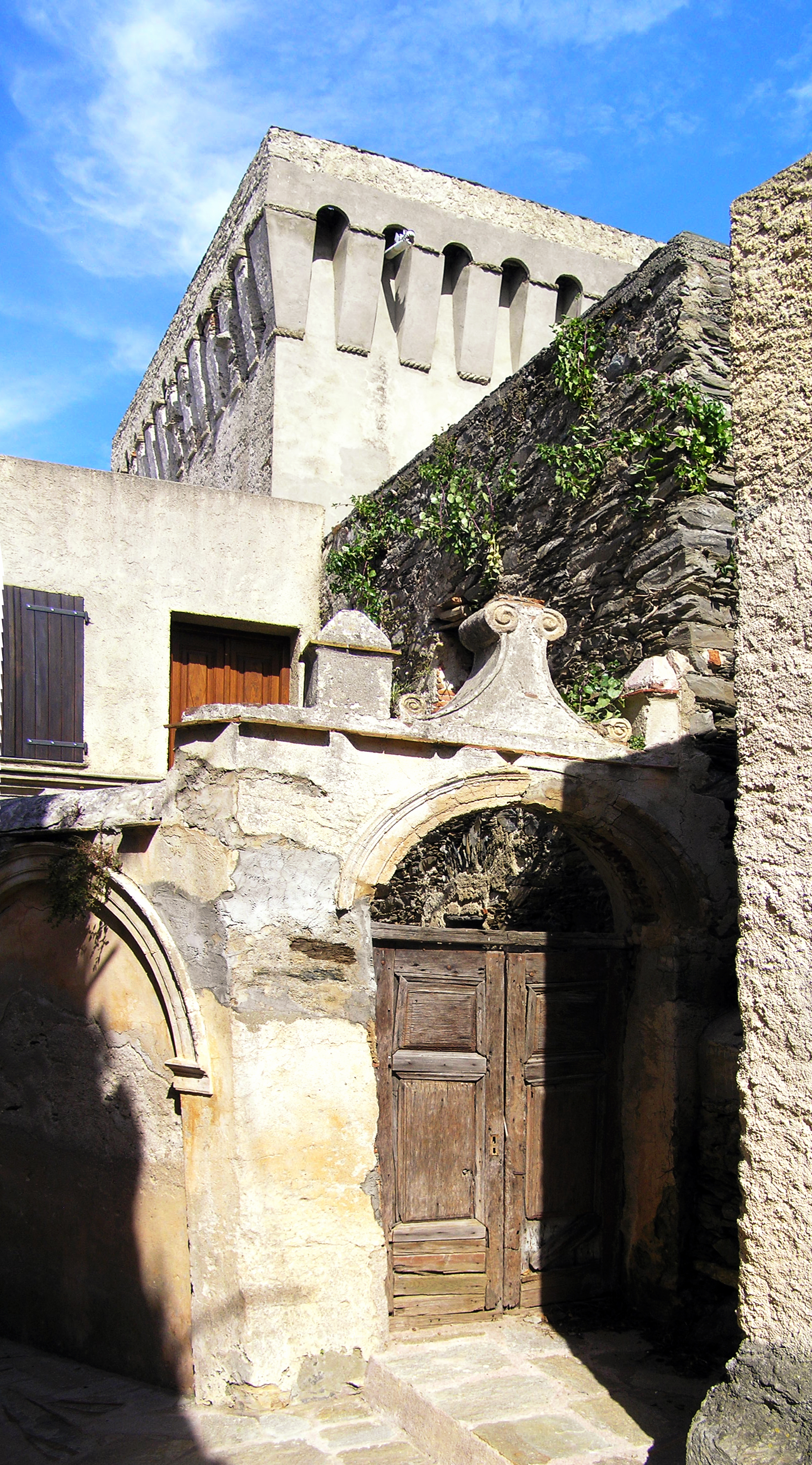 Tomino (Corsica) - Dans une ruelle de Poggio